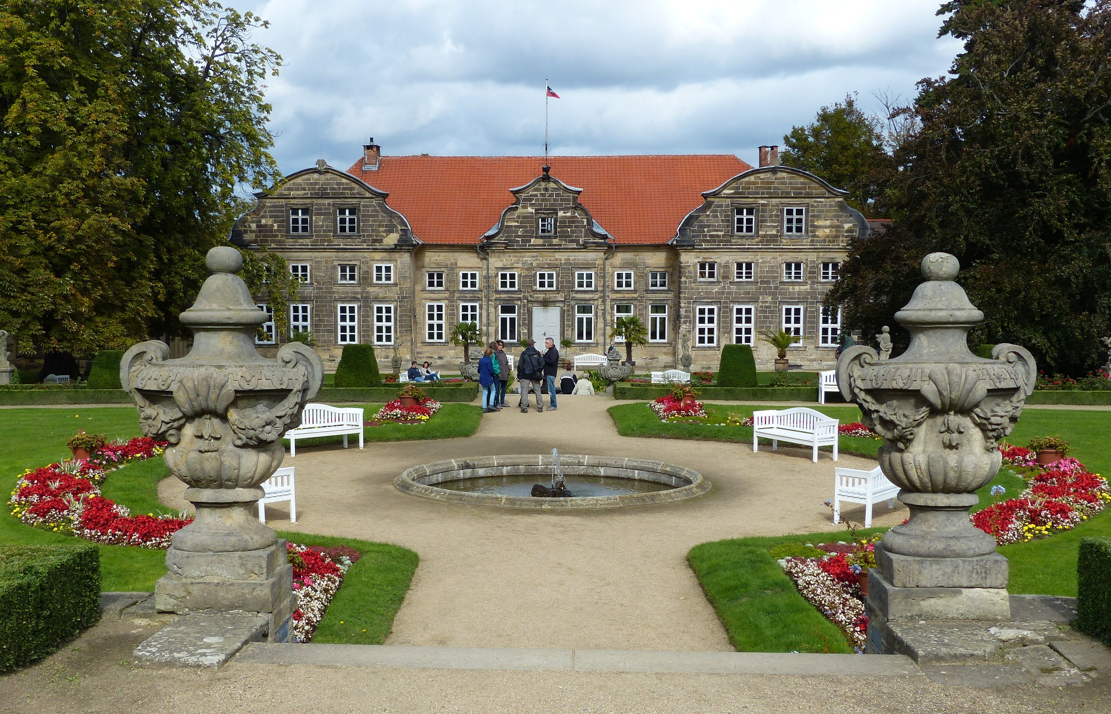 Das um 1725 zunächst als Gartenhaus am Fuße eines barocken Terrassengartens errichtete Gebäude erhielt um 1760 eine Sandsteinfassade, die ihm ein stattliches Aussehen verlieh. Seitdem wird es das "Kleine Schloss" genannt.